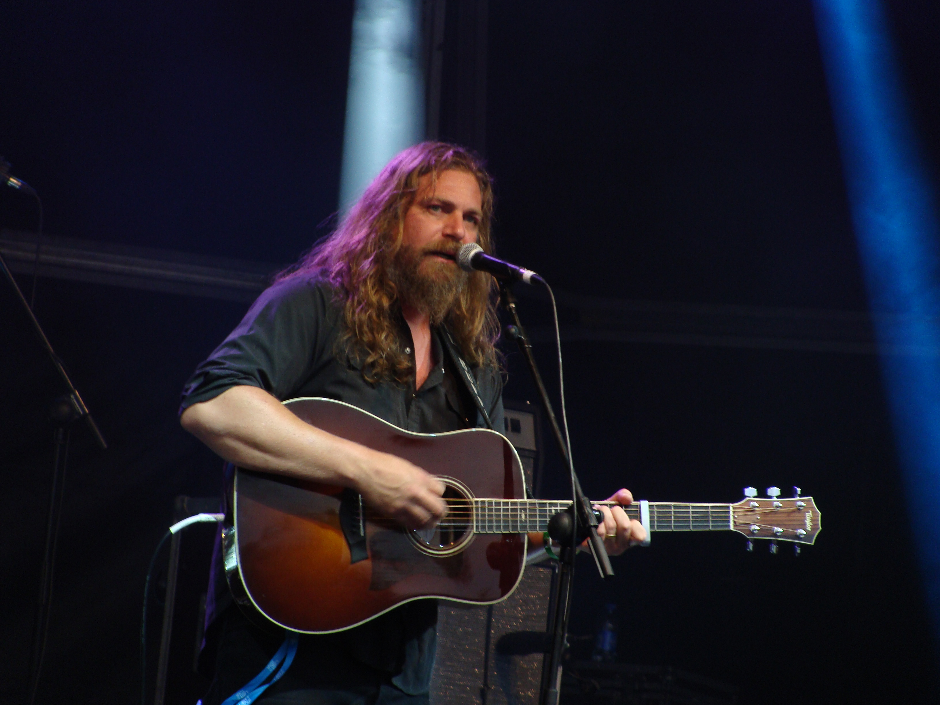 Jake Smith (The White Buffalo) en un concierto durante el Azkena Rock Festival de Vitoria-Gasteiz (junio de 2015)